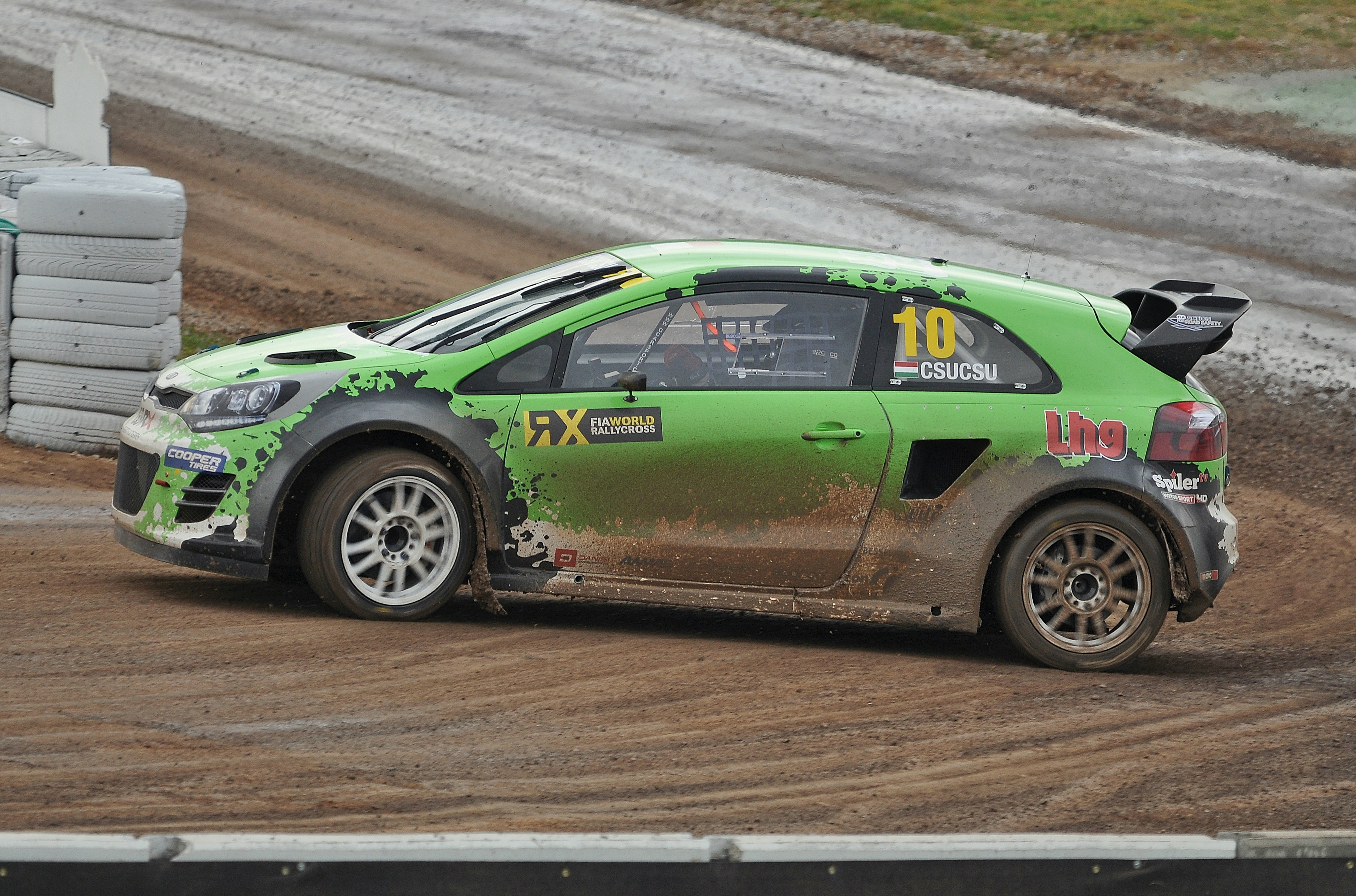 RX Barcelona